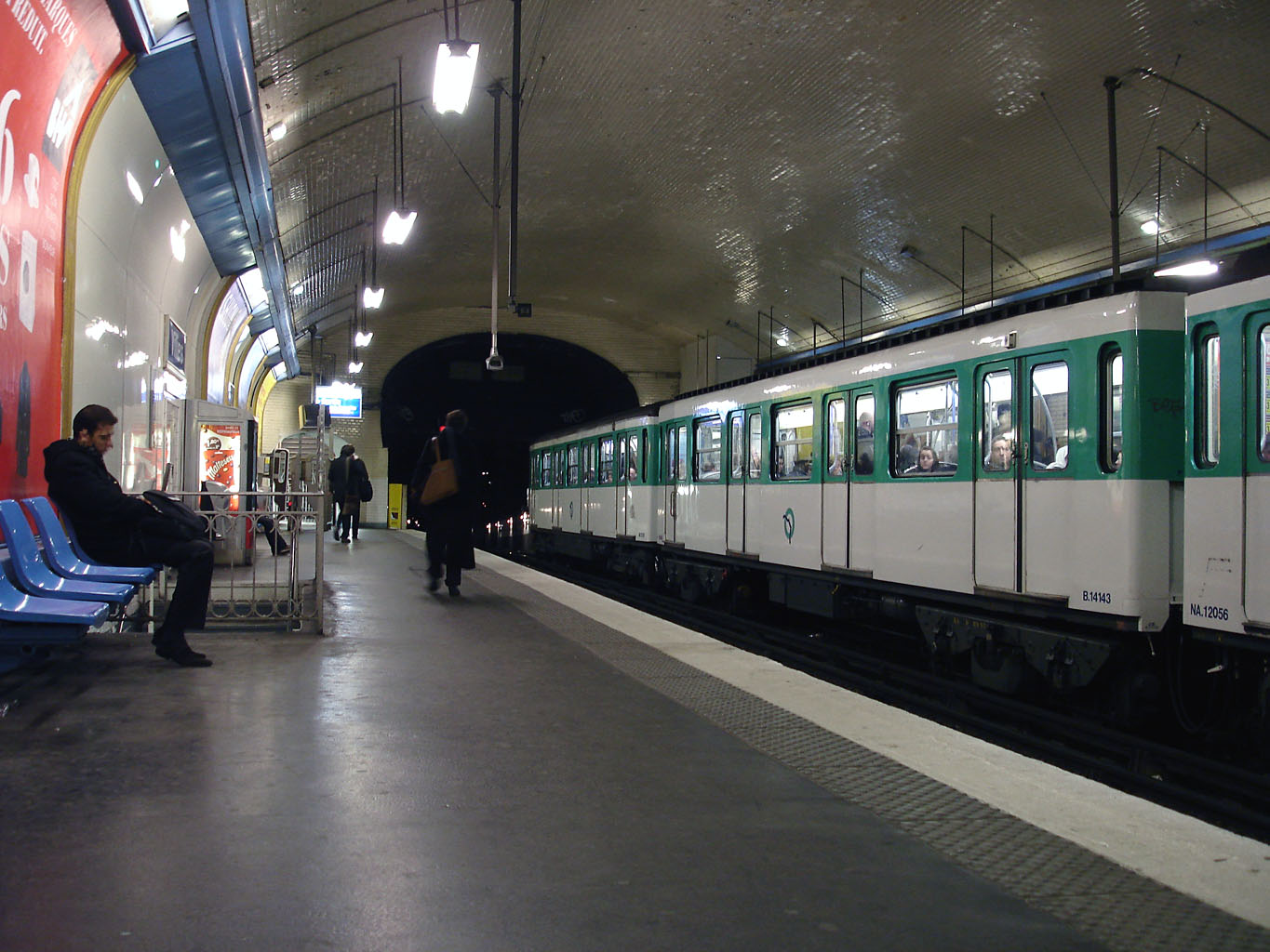 Station Villiers, de la ligne 3 du métro de Paris, France.